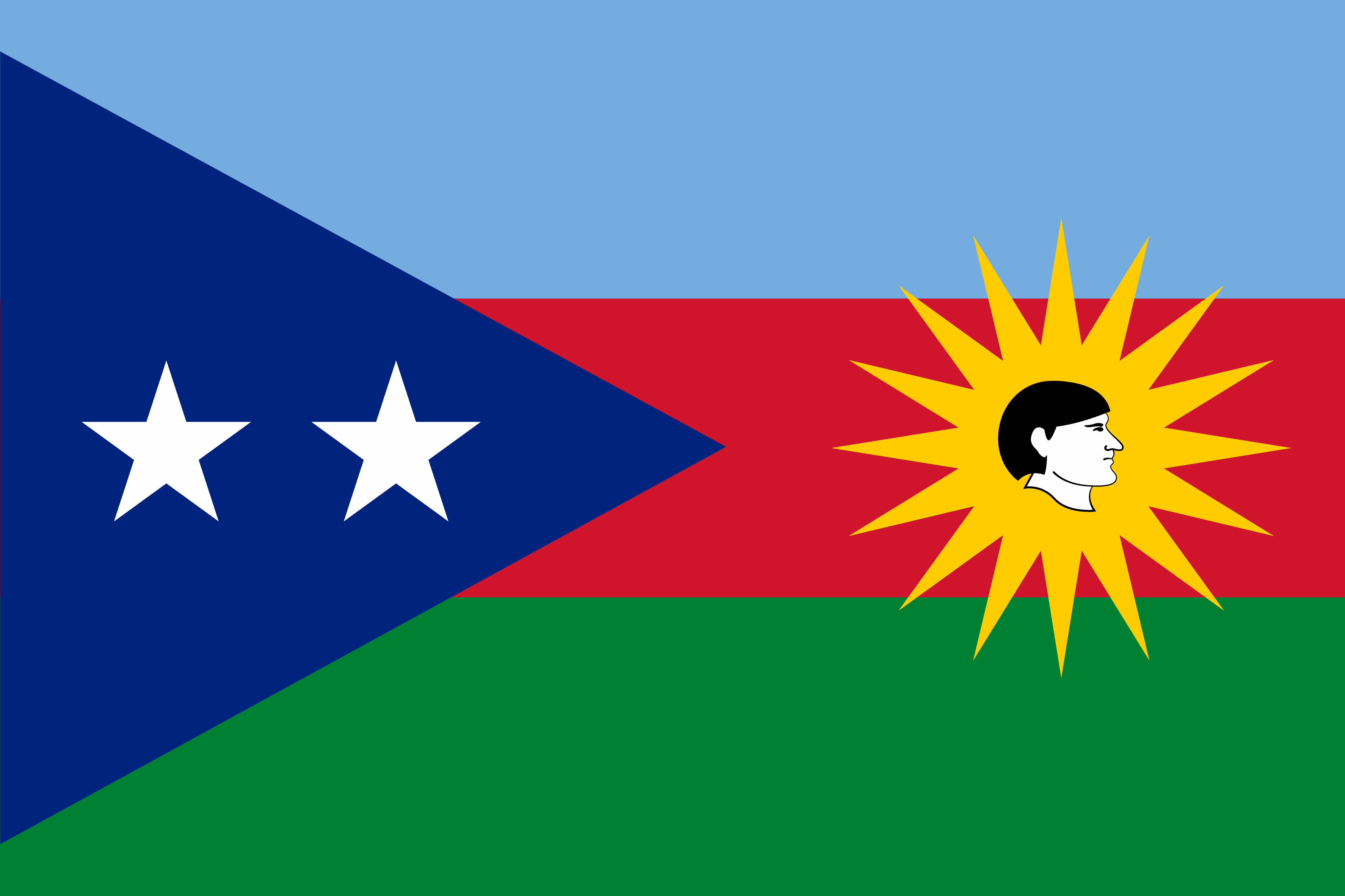 Bandera del municipio Guanta. Estado Anzoátegui. Venezuela